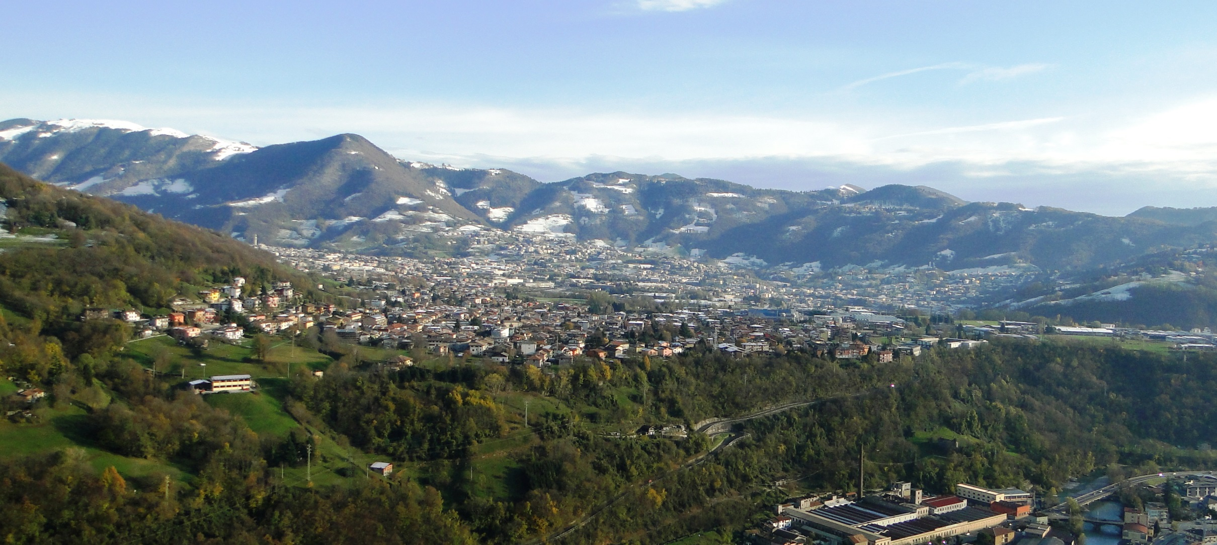 Panorama della Val Gandino